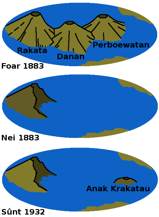 Skets fan trije tastannen fan de Kraktatau.